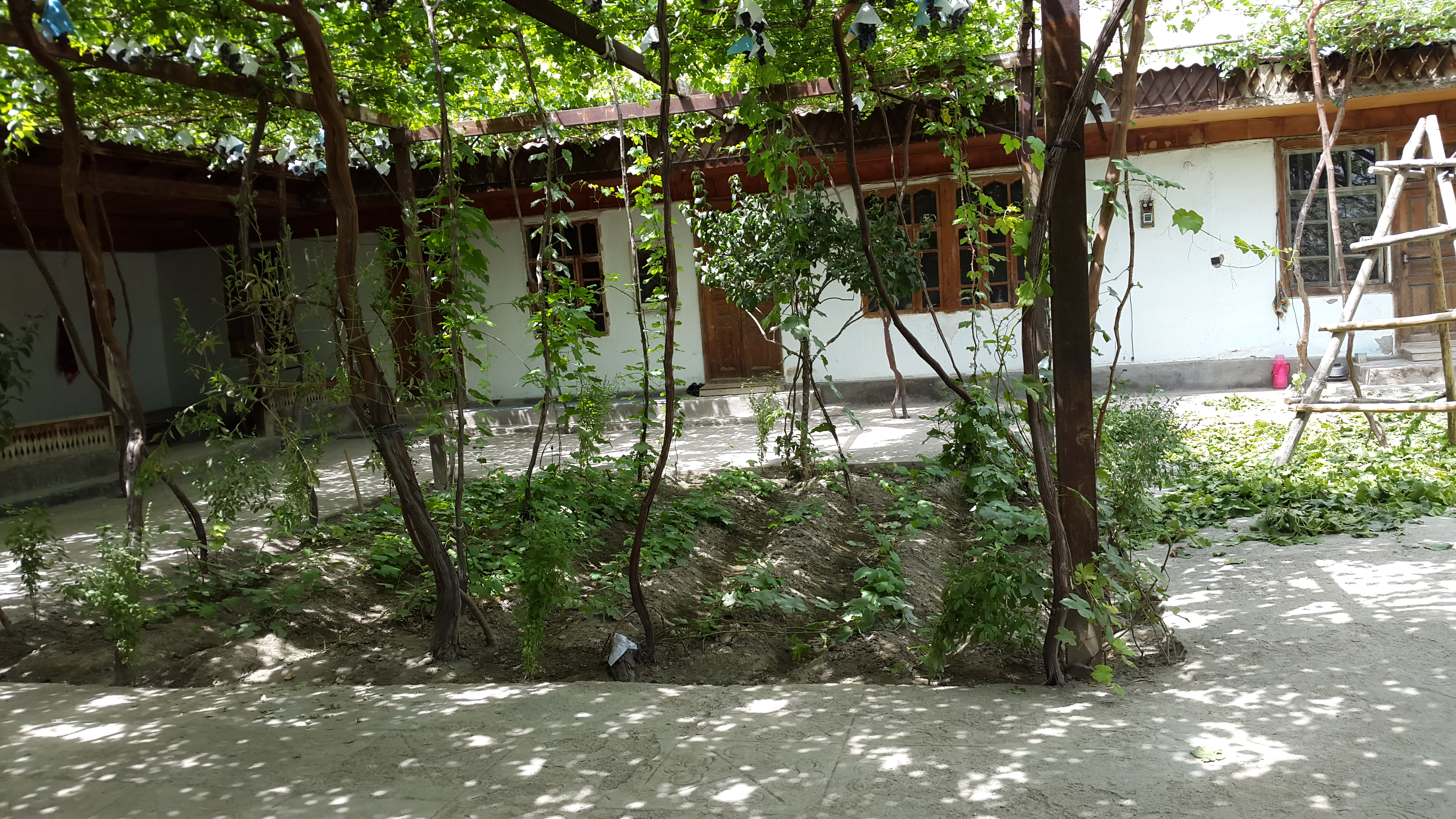 Двор в узбекском доме Ферганской области Узбекистана